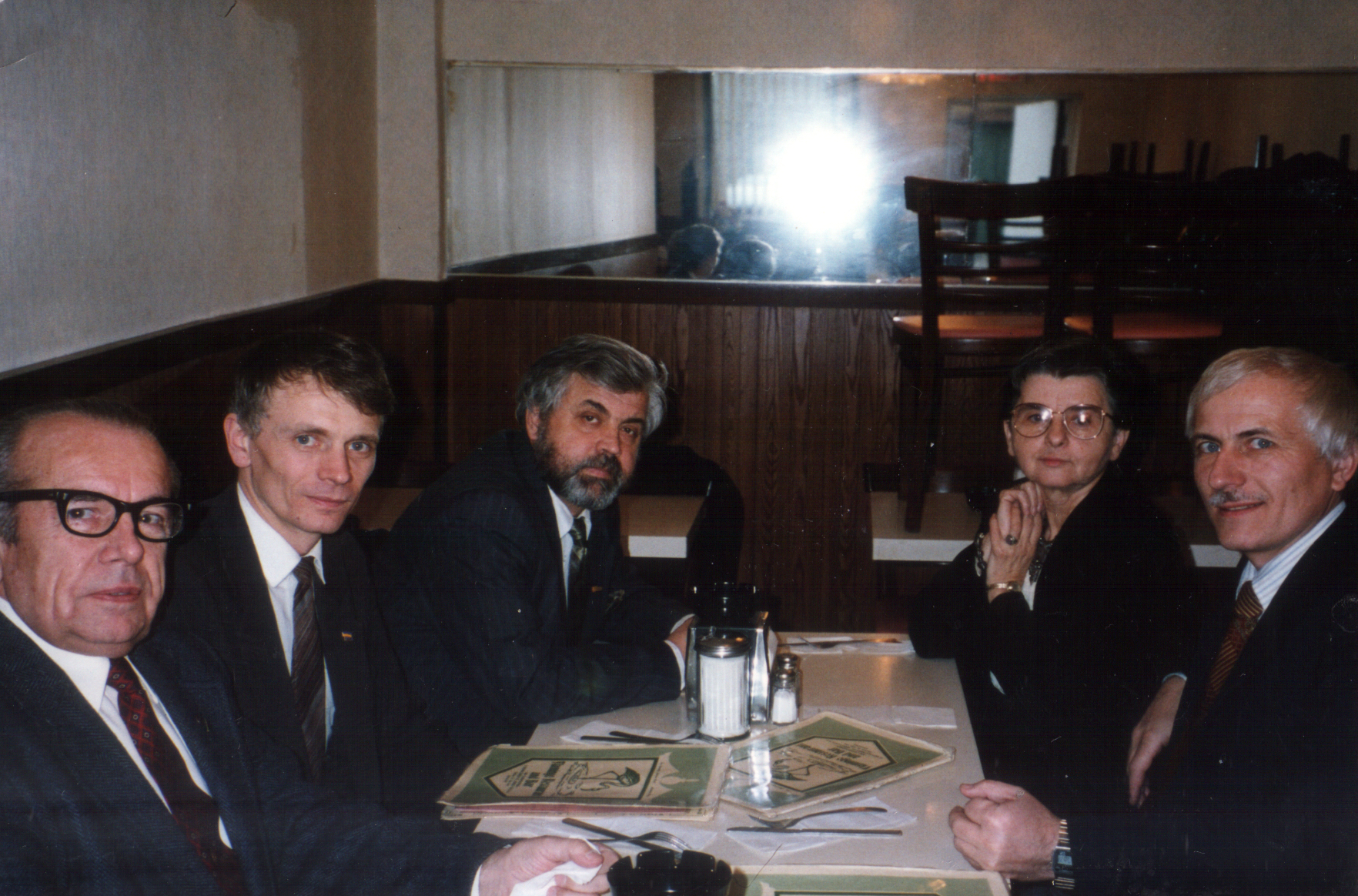 УНСоюз